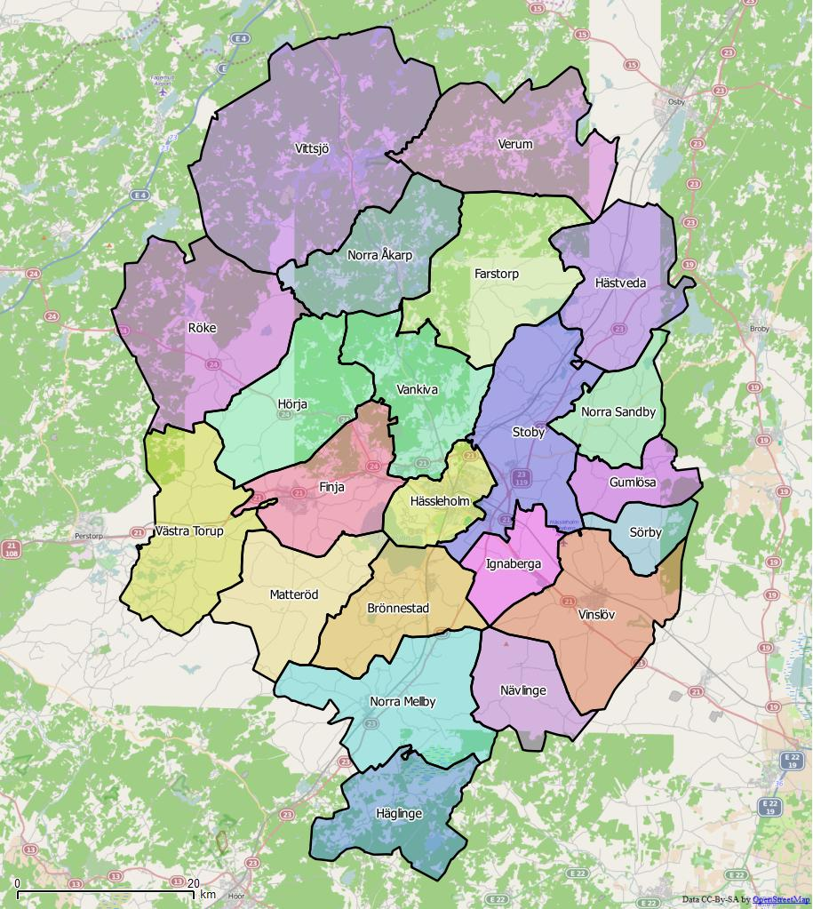 Distriktsindelningen i Hässleholms kommun World file: 100.56997815357887305 0 0 -100.56997815357887305 1481141.13982559065334499 7646449.35347562190145254